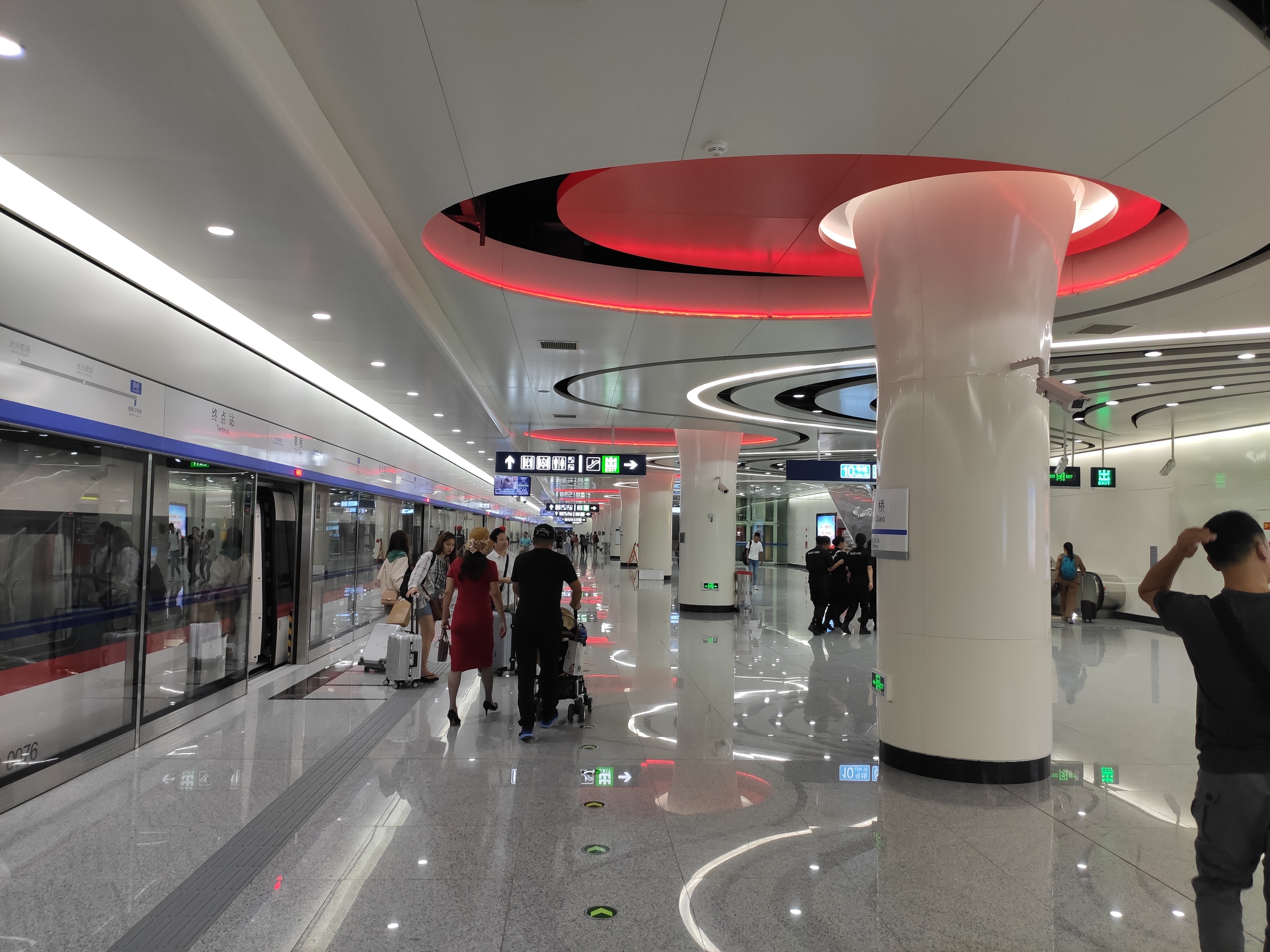 “北向”……或者目前来讲，“终点站”更准确些？